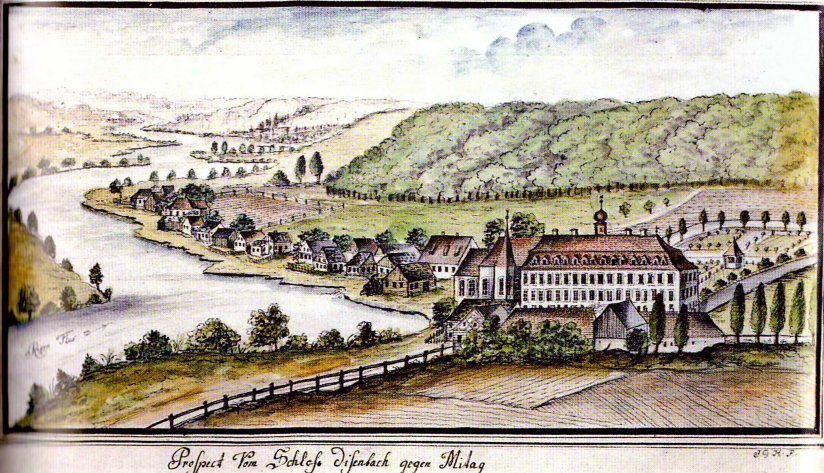 Schloss Diesenbach nach einem Stich von Johann Georg Hämmerl der Jüngere (1770-1838)